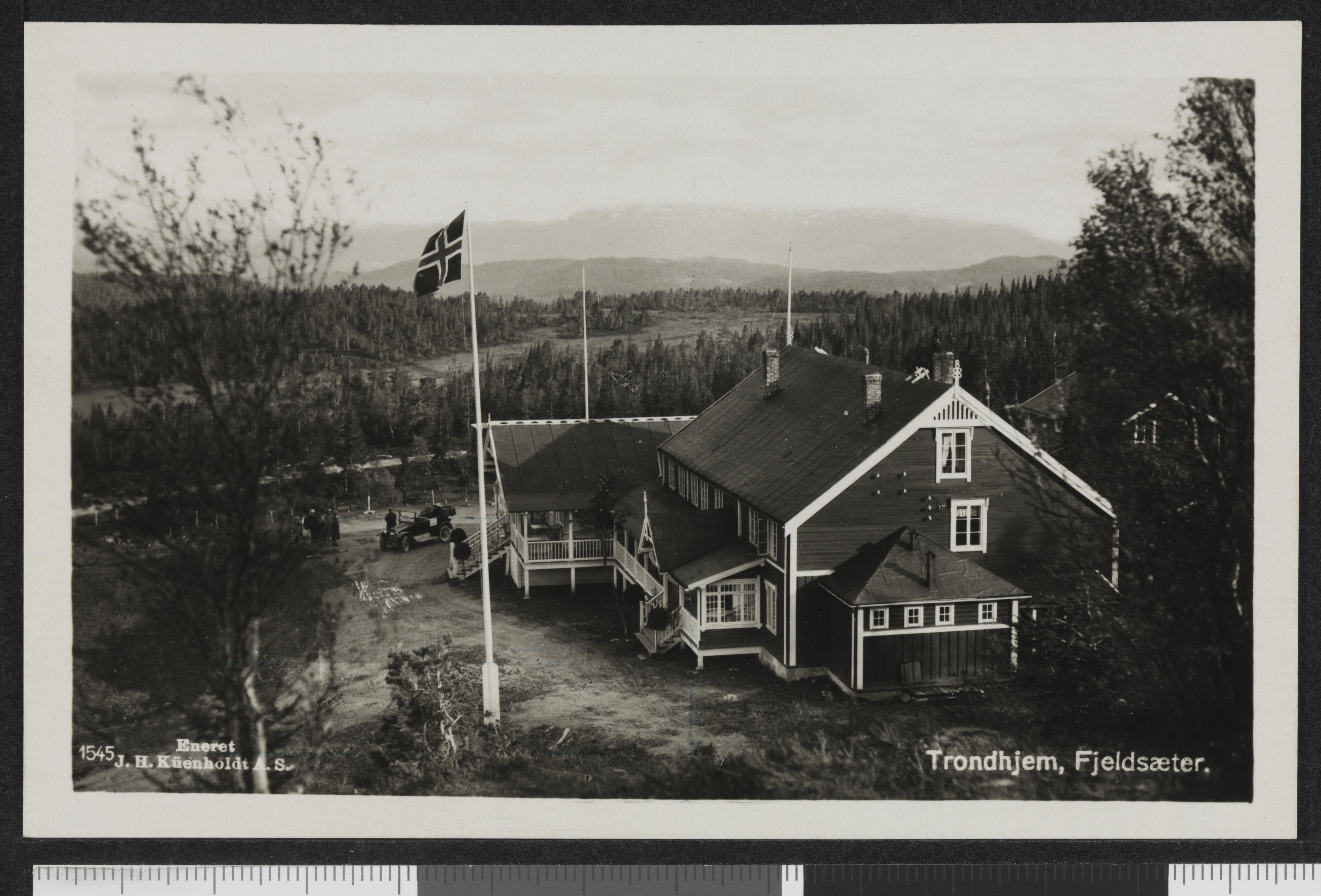 Bildet er hentet fra Nasjonalbibliotekets bildesamling Bymarka,Fjellseter, Trondheim, Sør Trøndelag